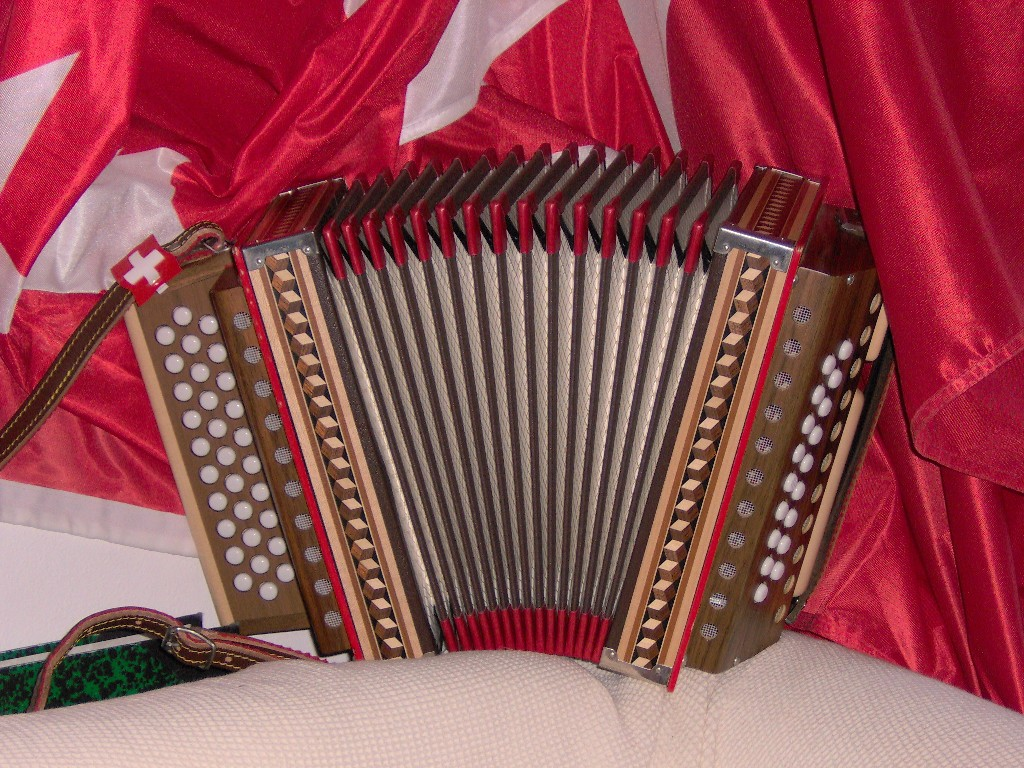 Schwyzerörgeli (auteur : Hervé Grand)